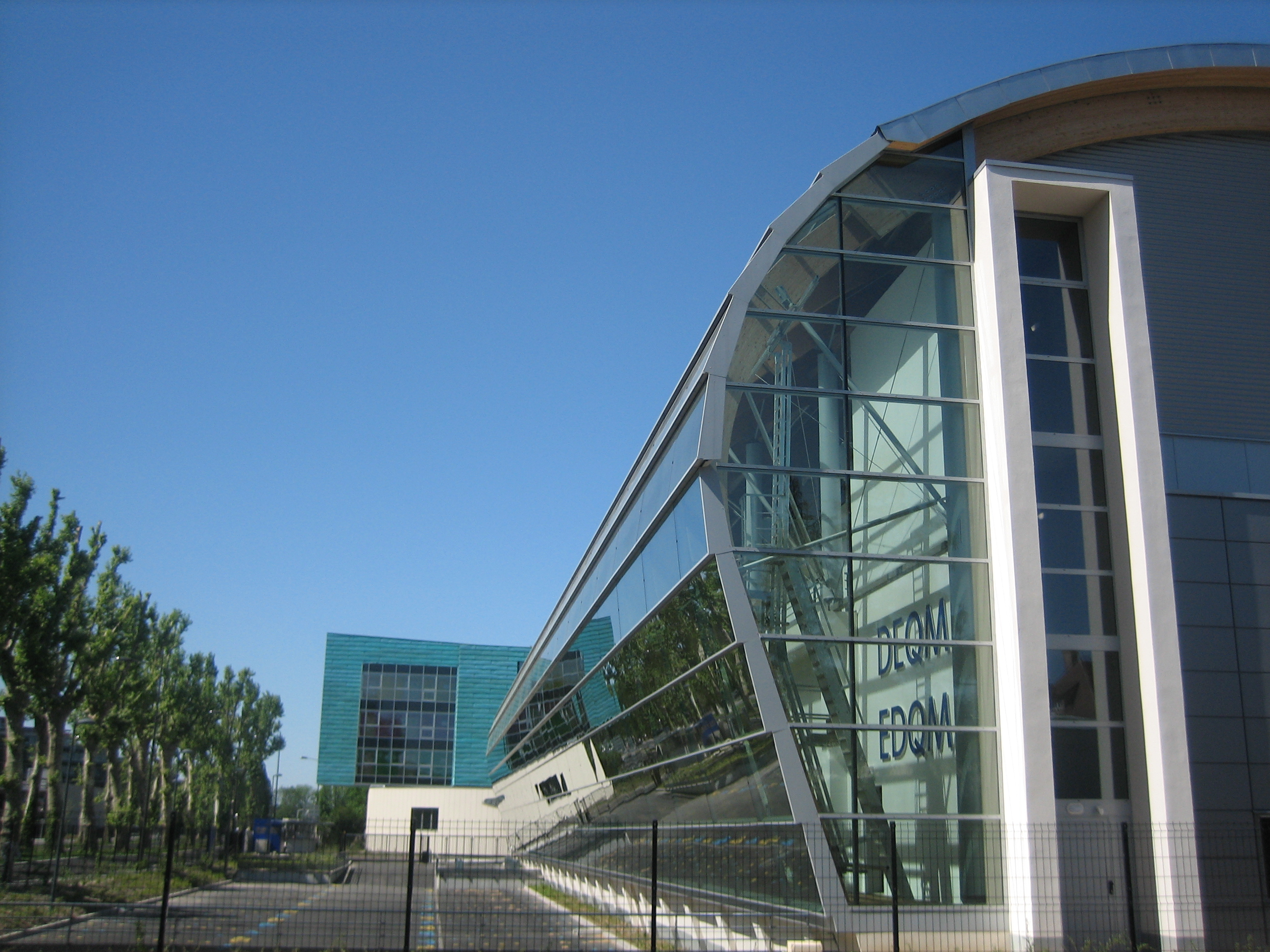 Pharmacopée européenne (DEQM/EDQM) à Strasbourg